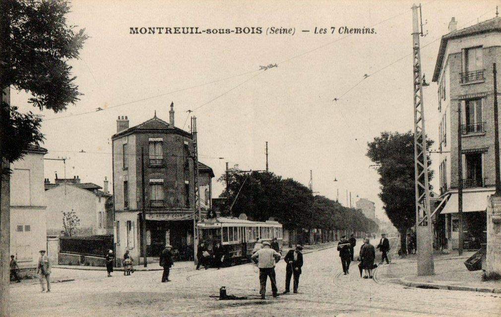 Montreuil-sous-Bois.Les Sept-Chemins